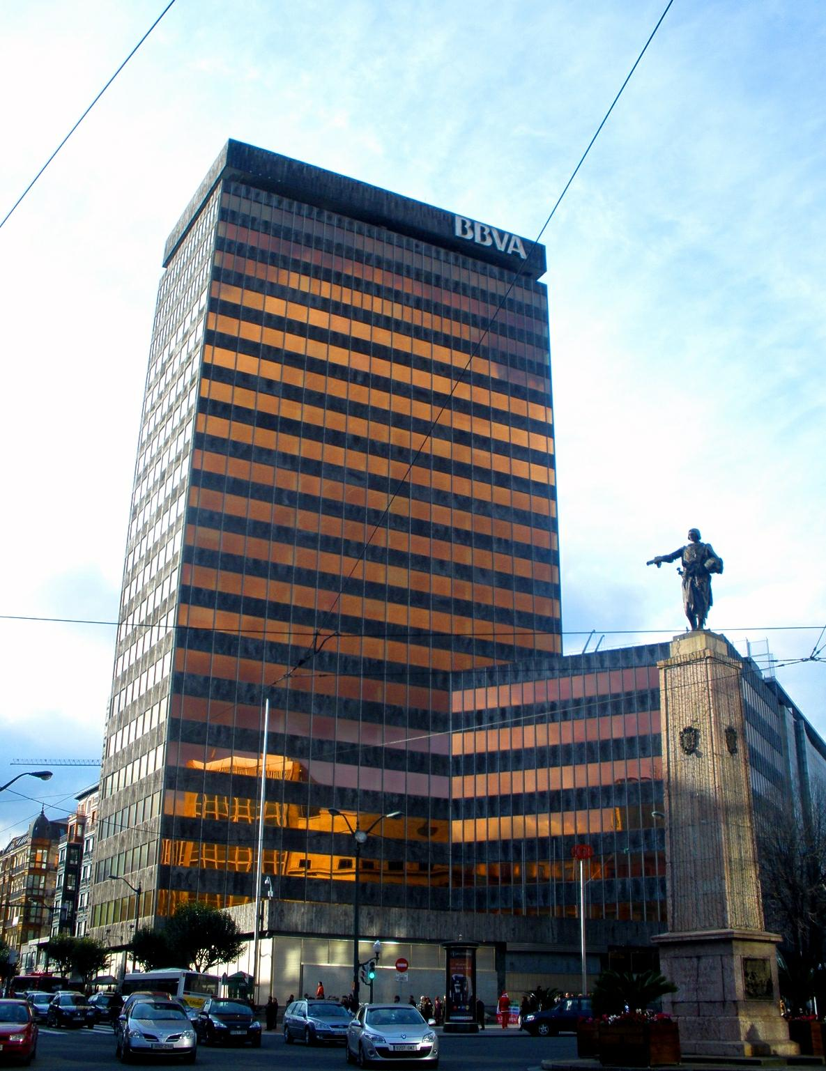 Bizkaiko Bankuaren eraikina (gaur egun, BBVA), Bilbon (Euskal Herria)